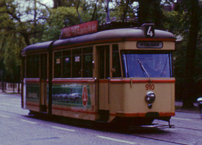 Straßenbahn Bremen, Wagen Nr. 910 (Typ GT3) am Sonntag, den 18. Mai 1963 auf der Linie 4 in dHorn